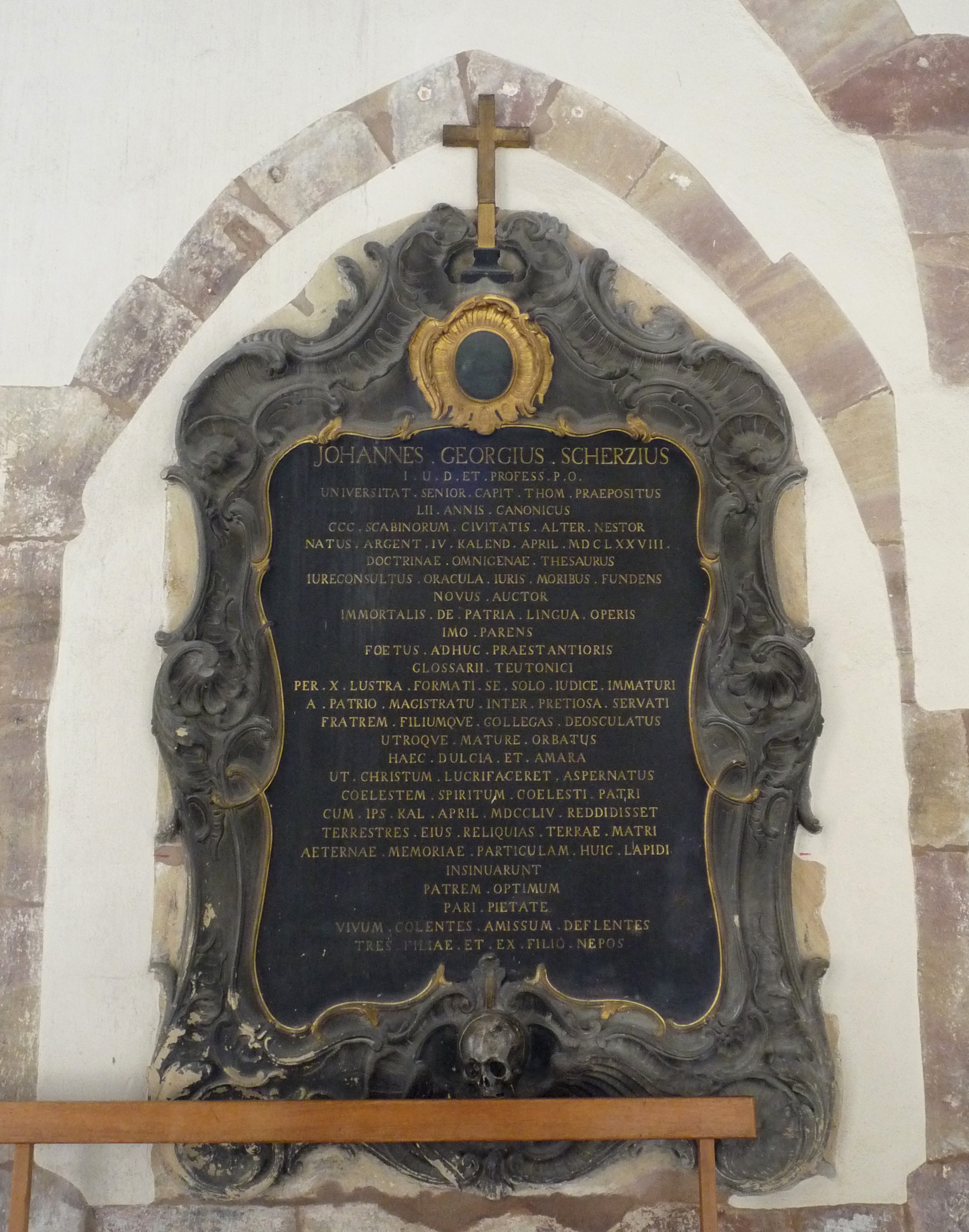 Cénotaphe du juriste et linguiste Jean-Georges Scherz à l'église Saint-Thomas de Strasbourg)